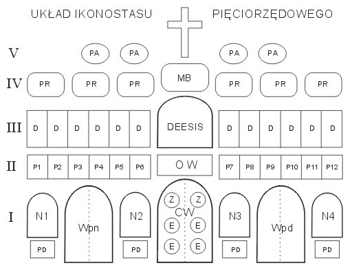 Schemat ikonostasu